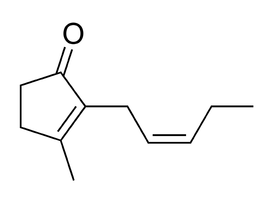 cis-jasmone chemical structure